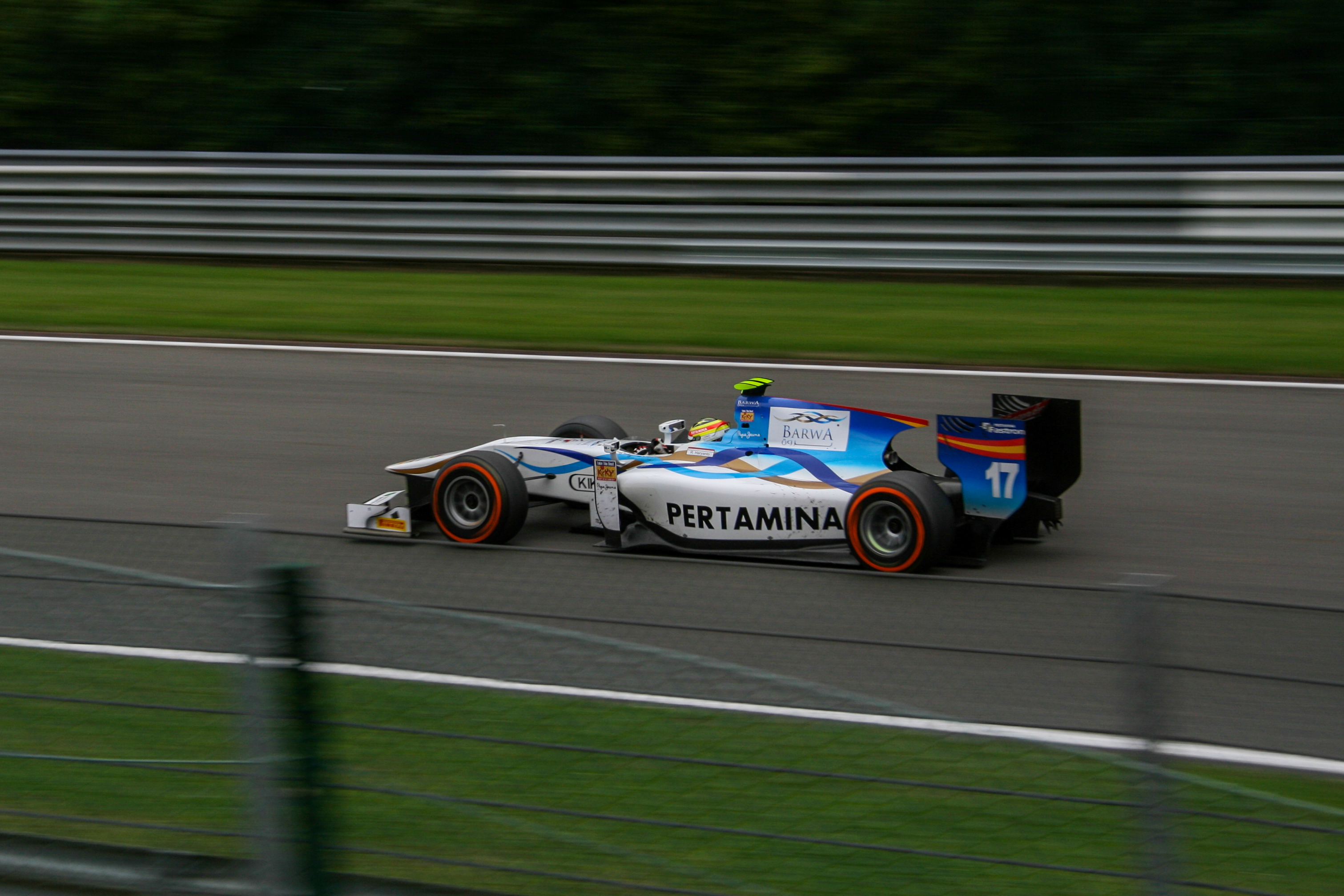 Rio Haryanto beim Hauptrennen im Belgien 2013